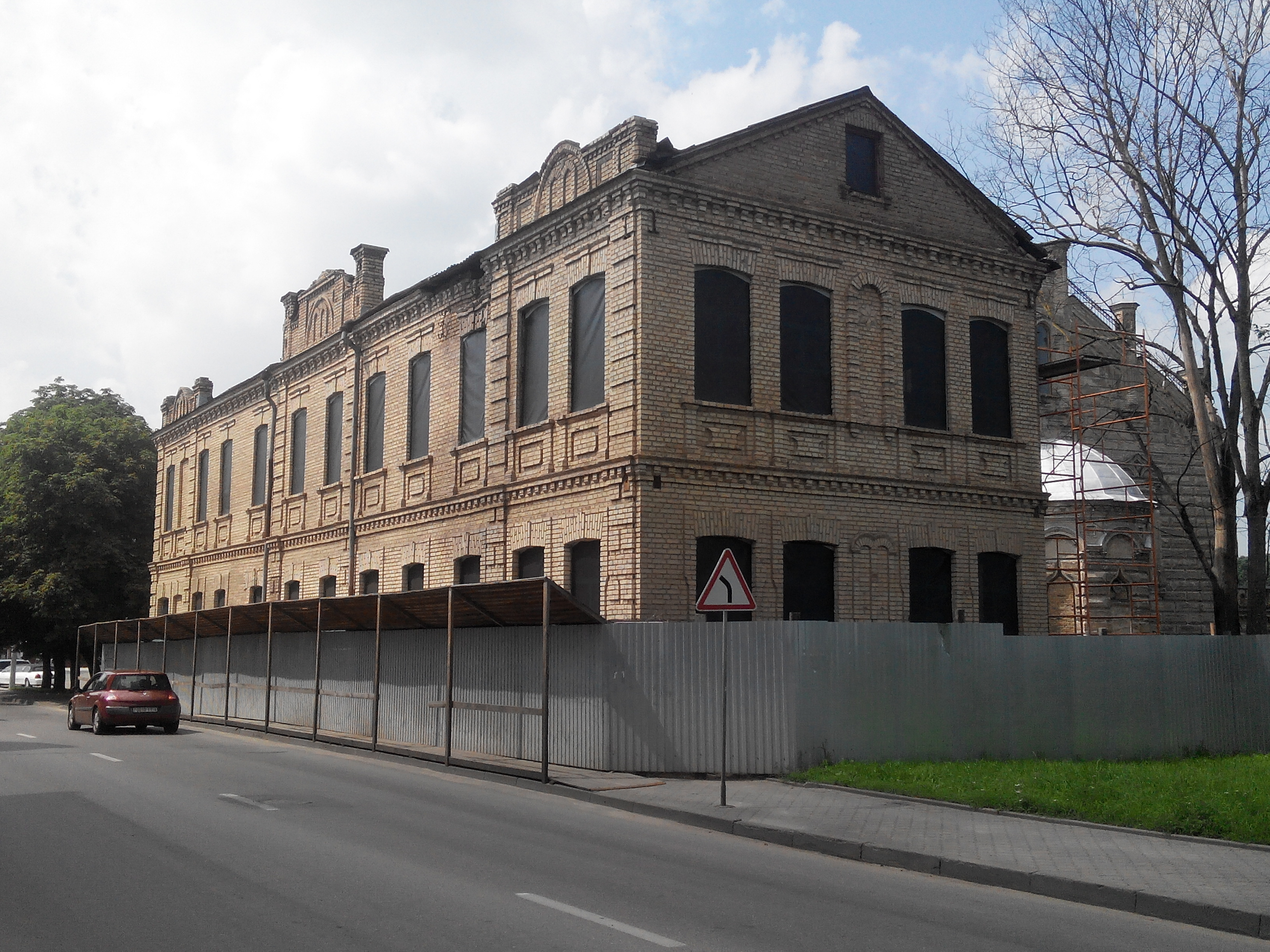 Будынак на вуліцы Вялікая Траецкая, 57, Гродна, Беларусь